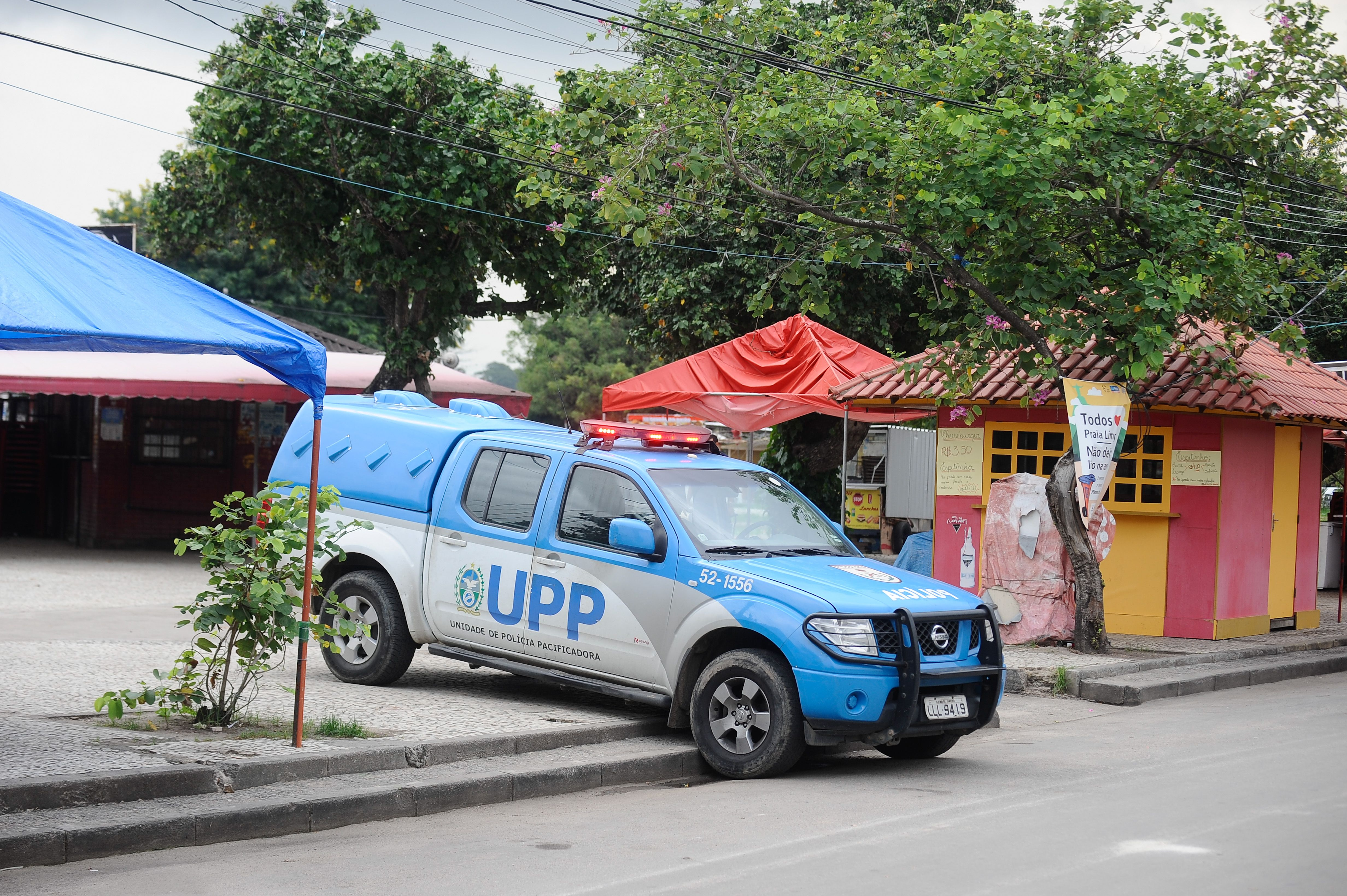 A Polícia Militar do Estado do Rio de Janeiro dá início ao processo de transição da Força de Pacificação no patrulhamento do conjunto de favelas da Maré, na zona norte do Rio de Janeiro.